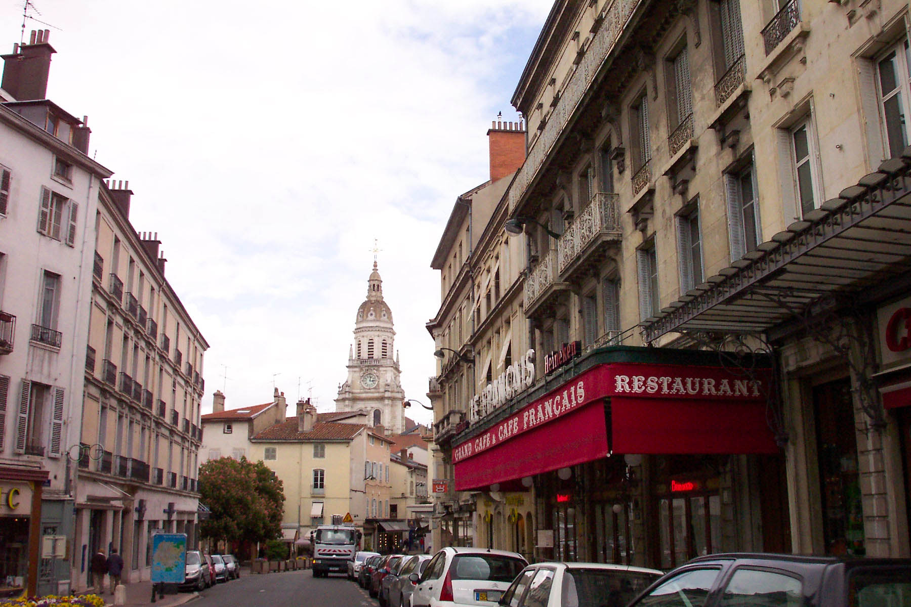 Avenue Alsace-Lorraine, (photo personnel 2004).